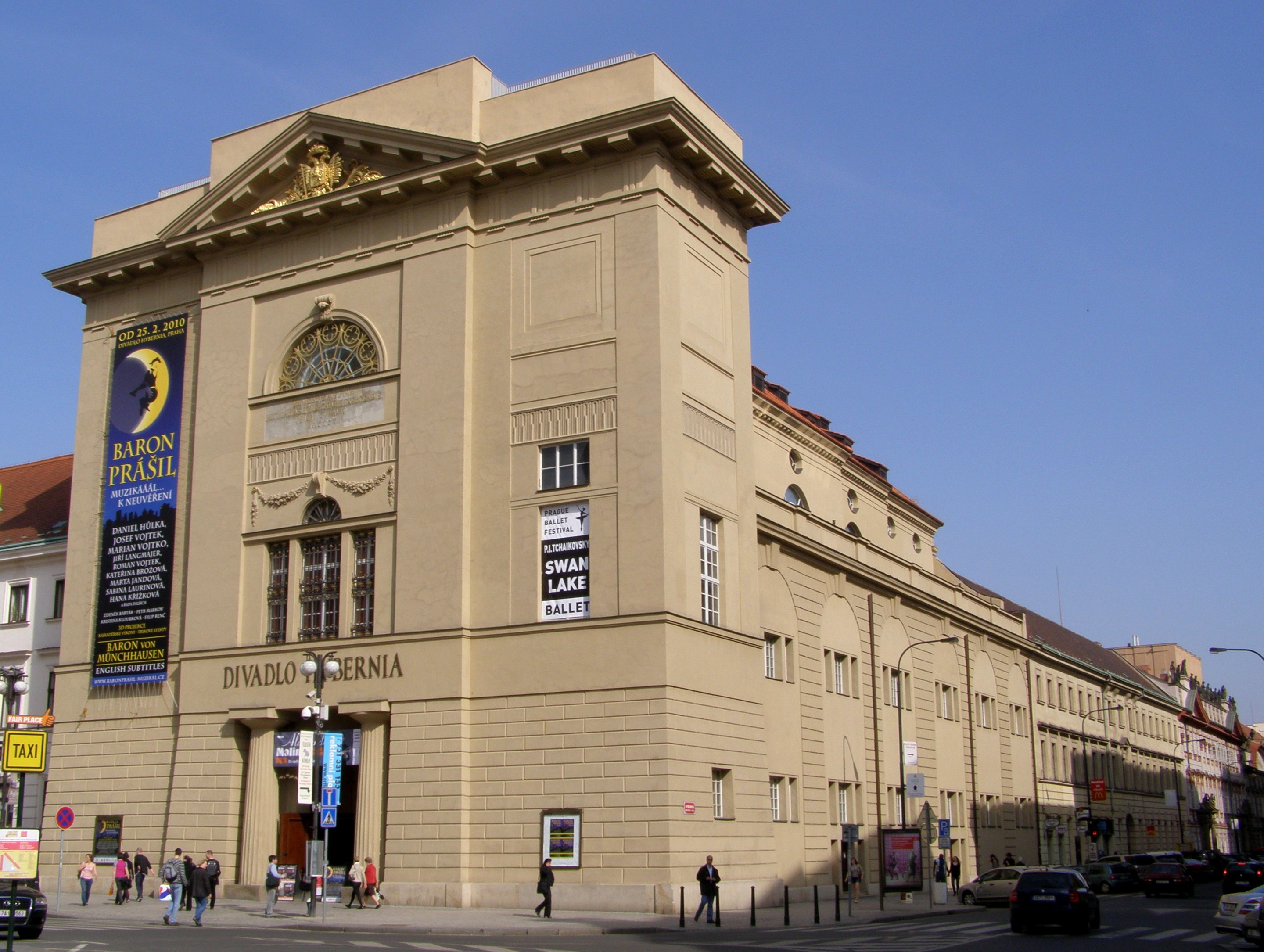 Praha, Nové Město, dům U Hybernů